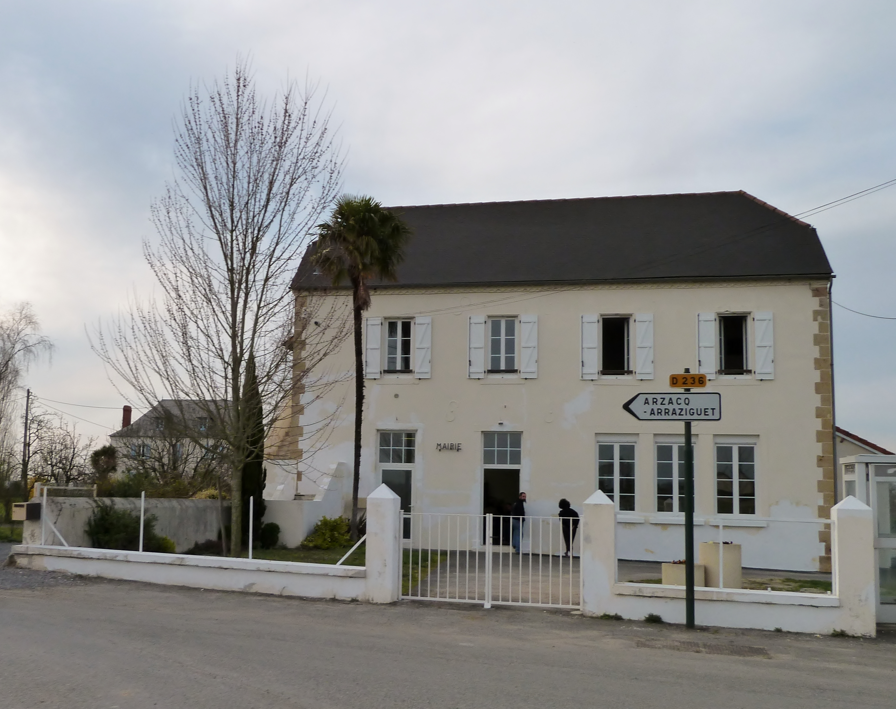 Mairie de Coublucq